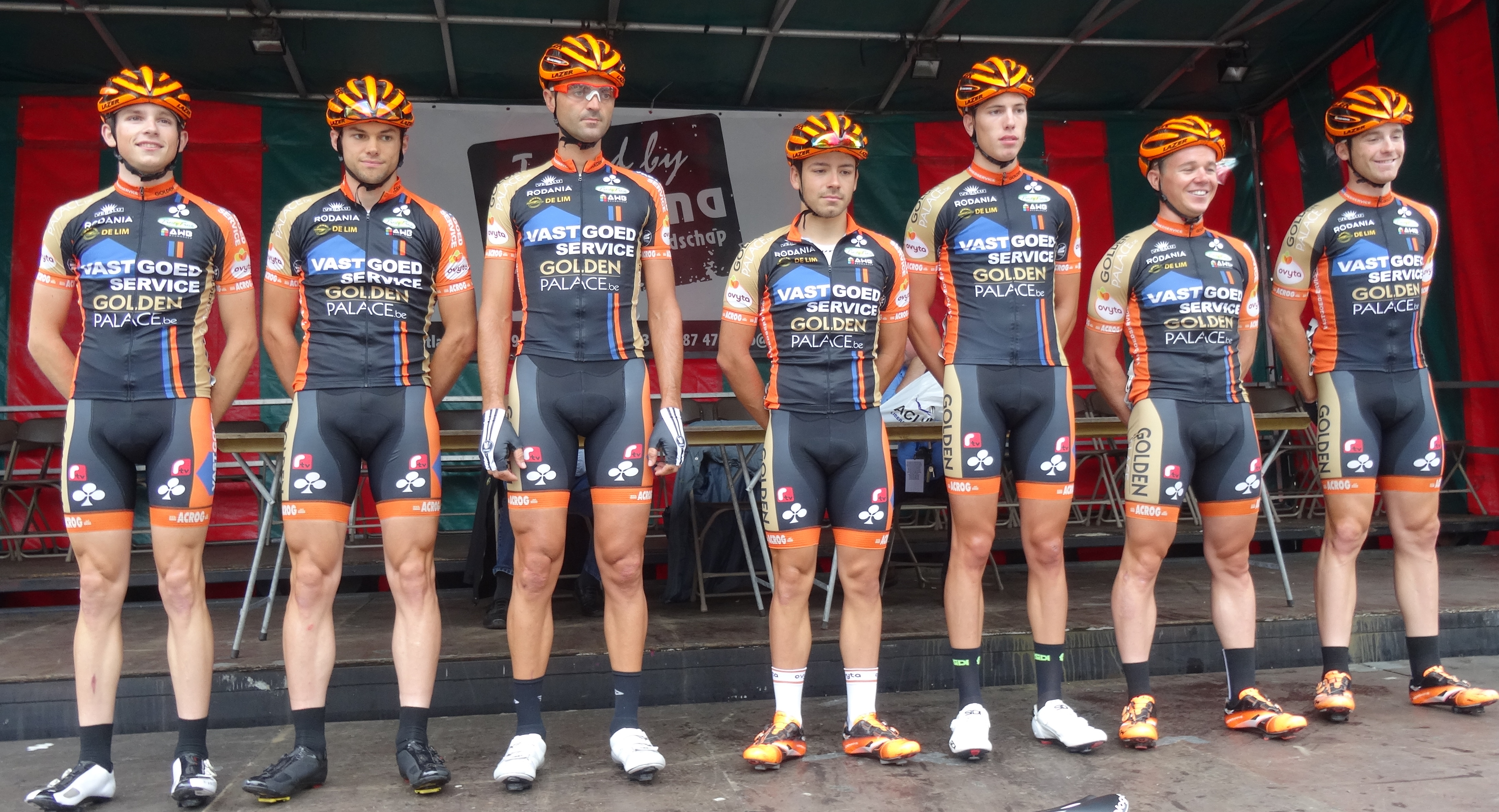 Reportage photographique réalisé le dimanche 10 août à l'occasion du départ et de l'arrivée de la Flèche du port d'Anvers 2014 à Merksem (Anvers), Belgique.